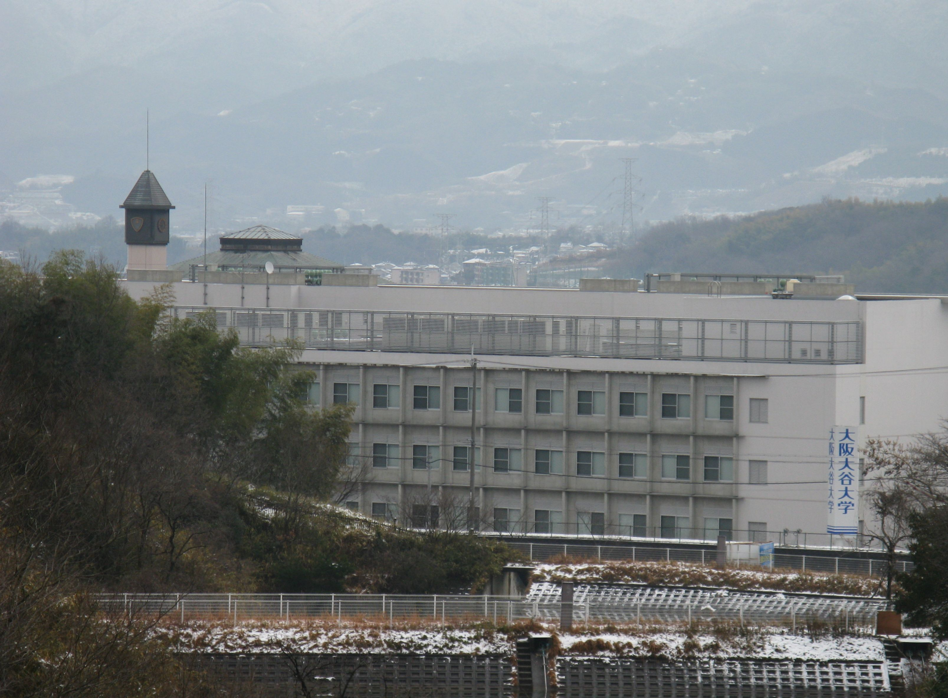 Osaka Ohtani University